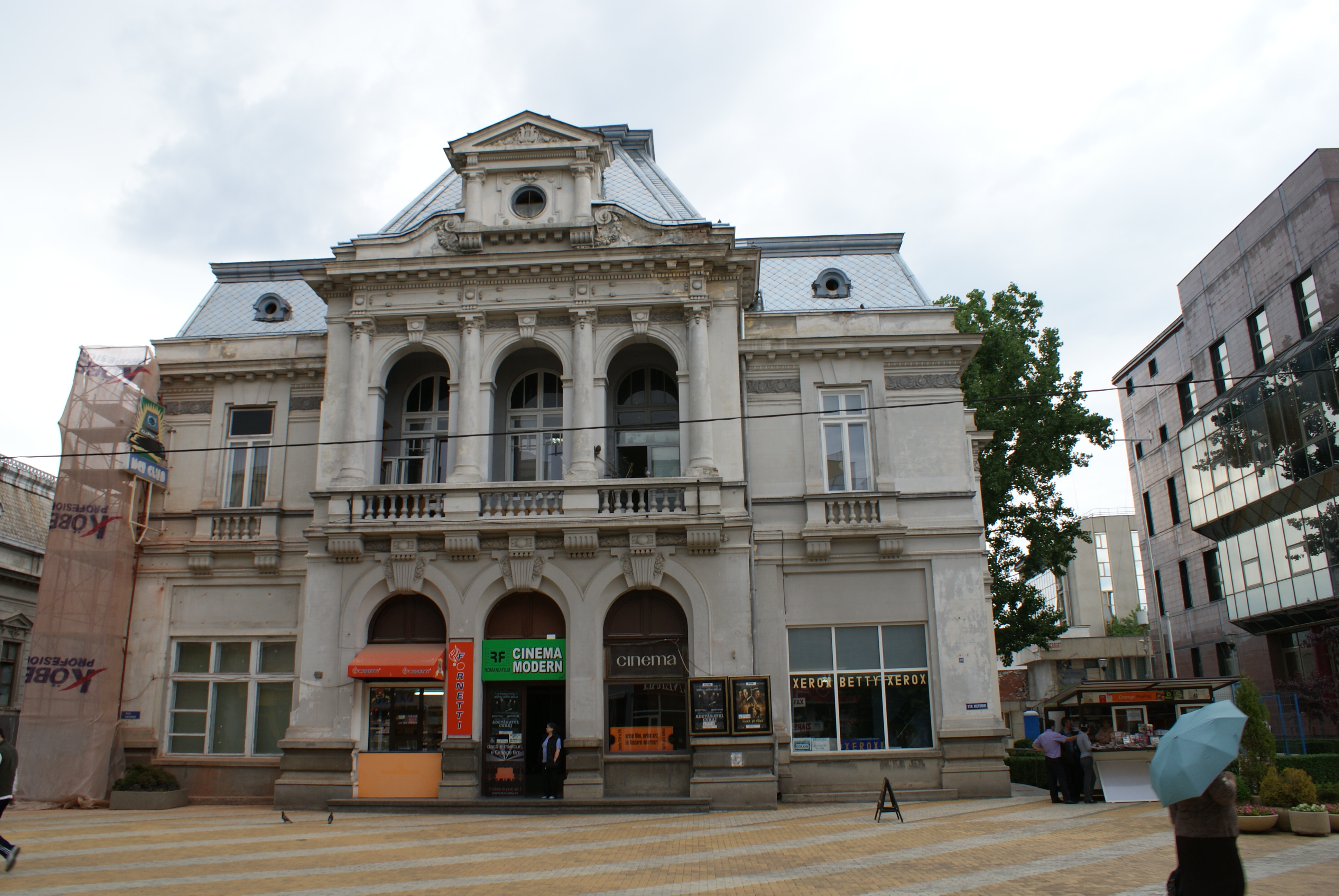 Banca Populară